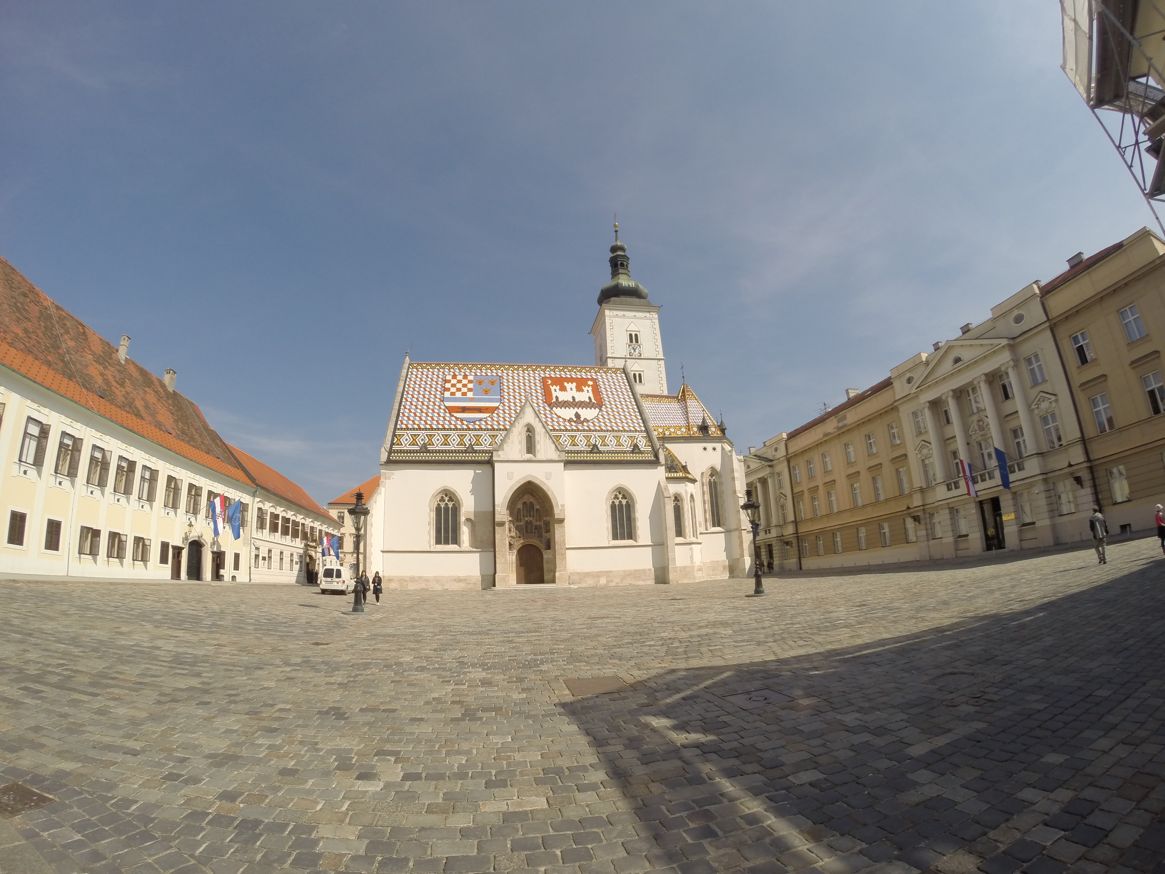 St.-Markus-Kirche Zagreb